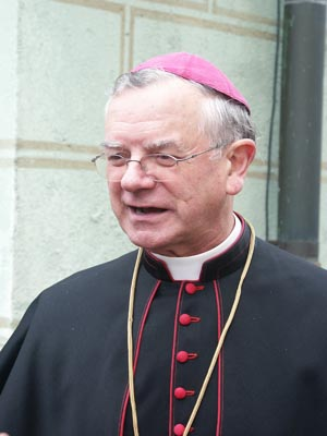 Augsburger Altbischof Viktor Josef Dammertz bei der Feier des 250. Geburtstags der Wallfahrtskirche "Unseres Herren Ruhe" in Friedberg/Bayern am 11. Oktober 2003